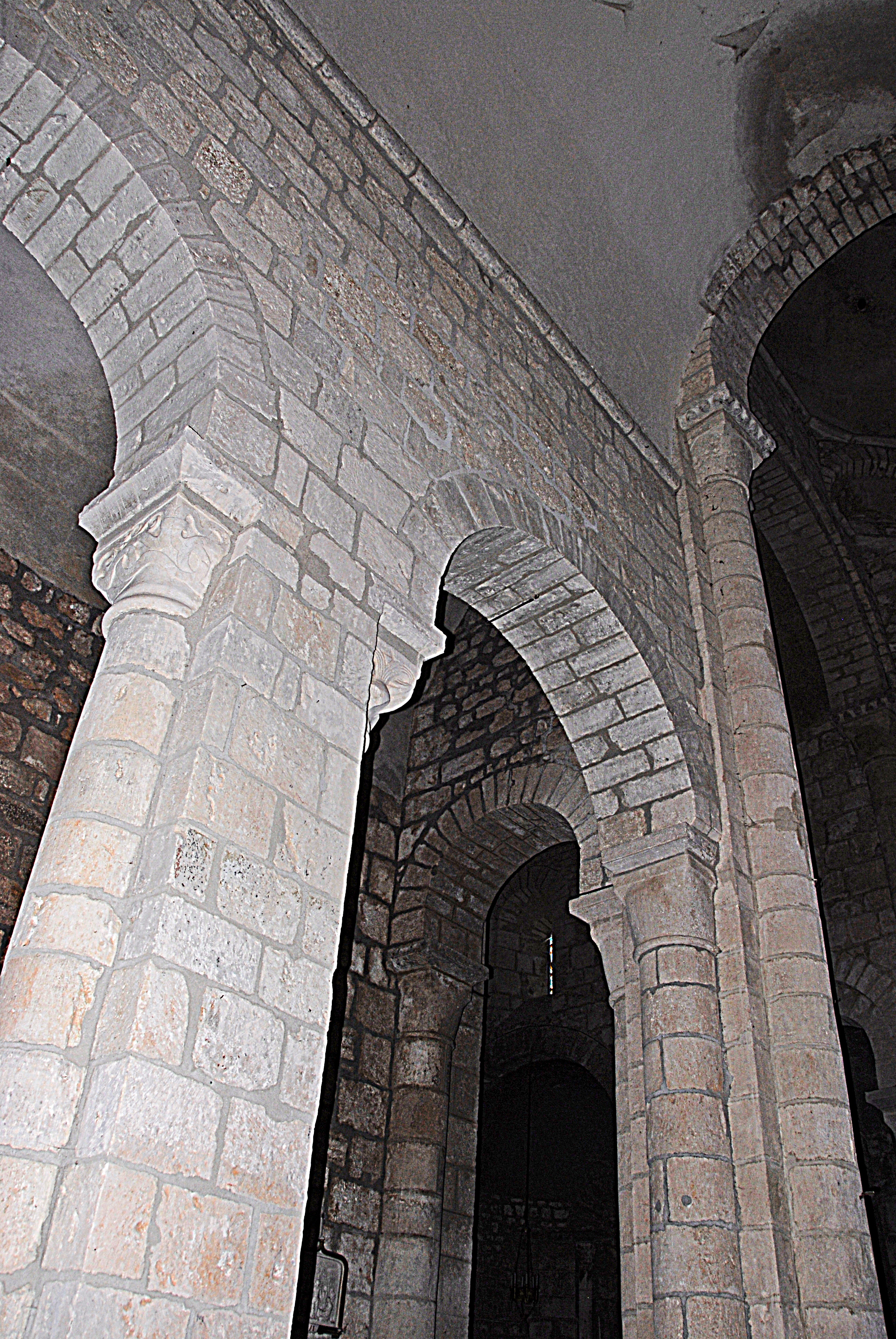 Ste-Croix de Veauce, Mittelschiff Nordseite